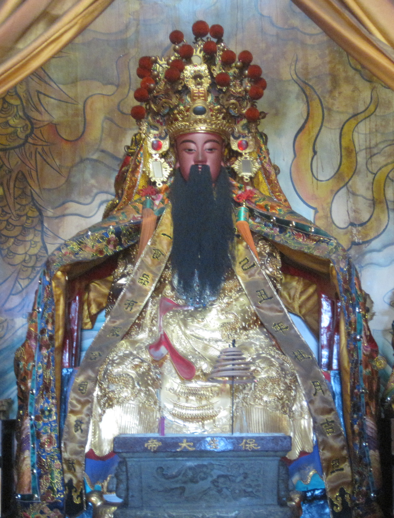 新化保生大帝宮保生大帝像